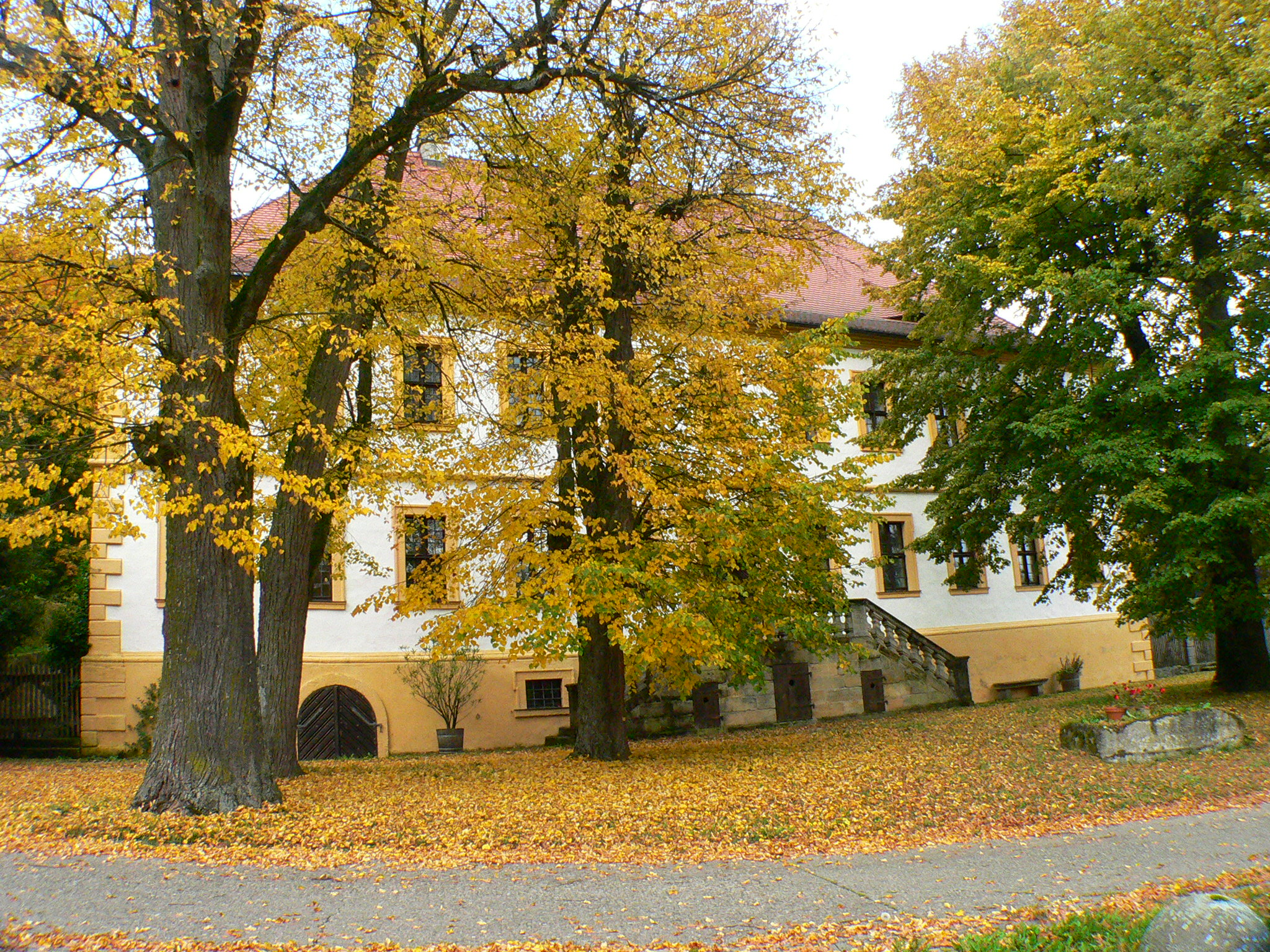 Schloss Weißenbrunn bei Ebern (Bayern)